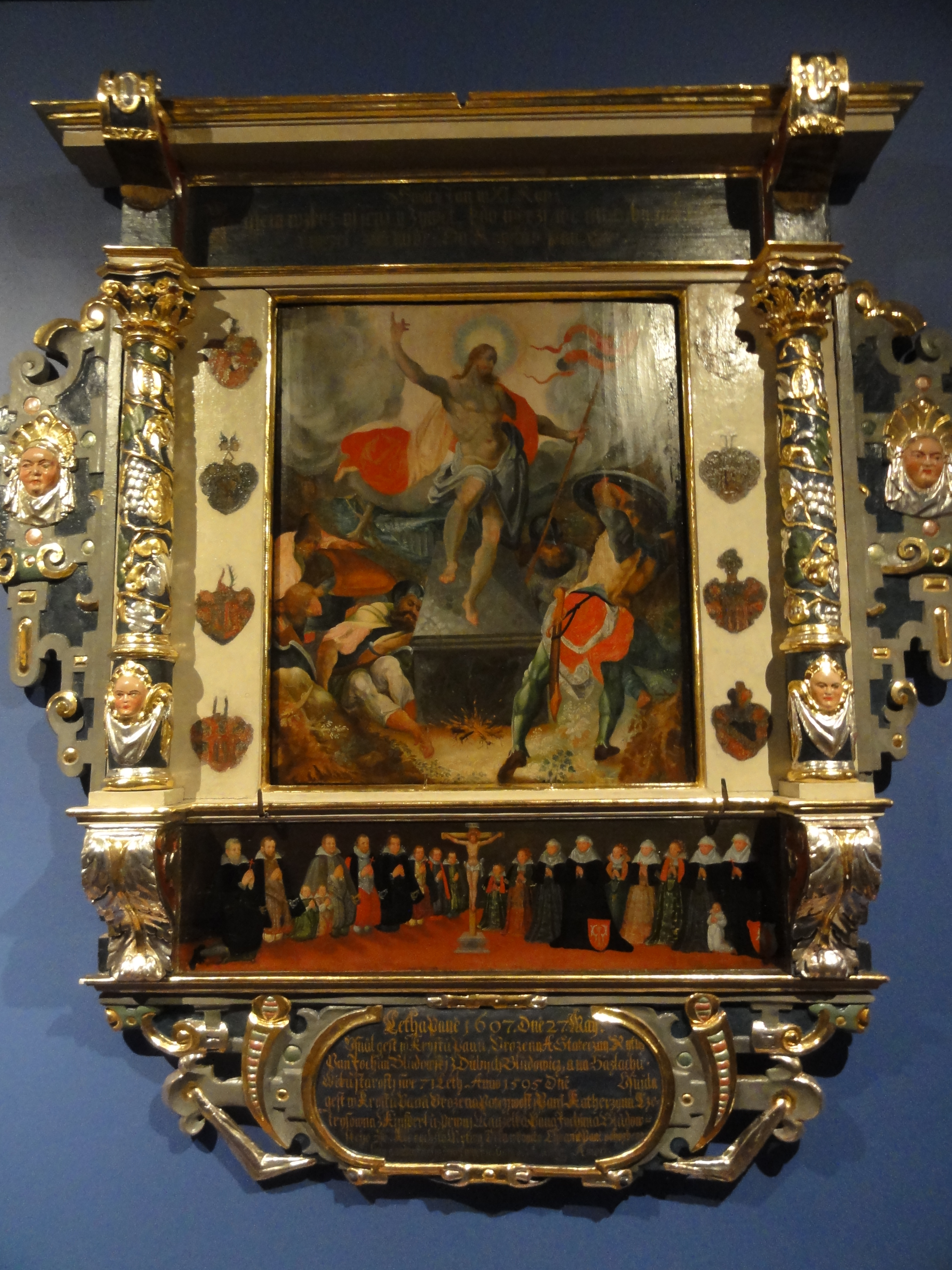 Muzeum ŚC - Epitafium Joachima Bludowskiego z Dolnych Blędowic, ufundowana w 1620